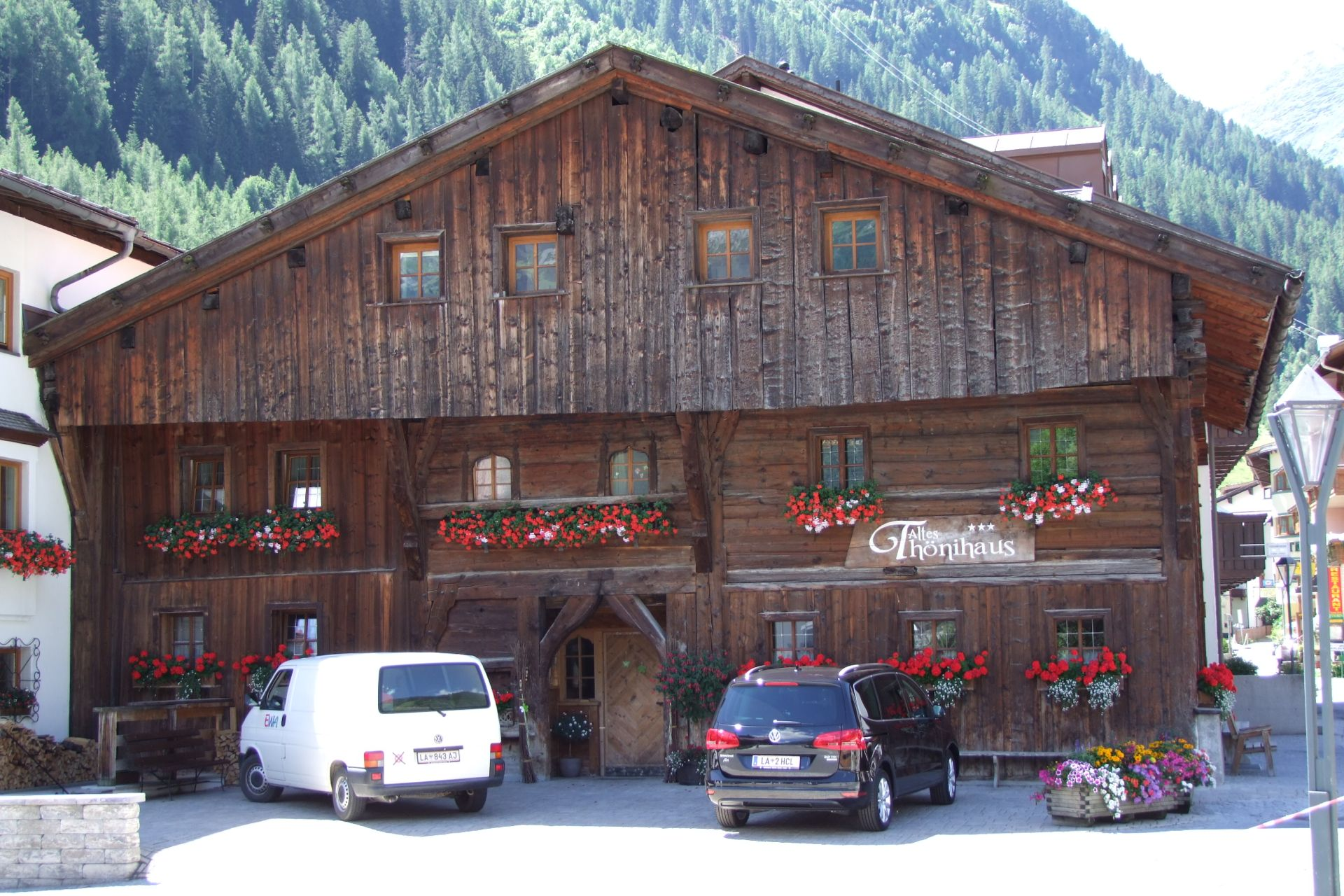 Schüttkasten, Thöni-Haus